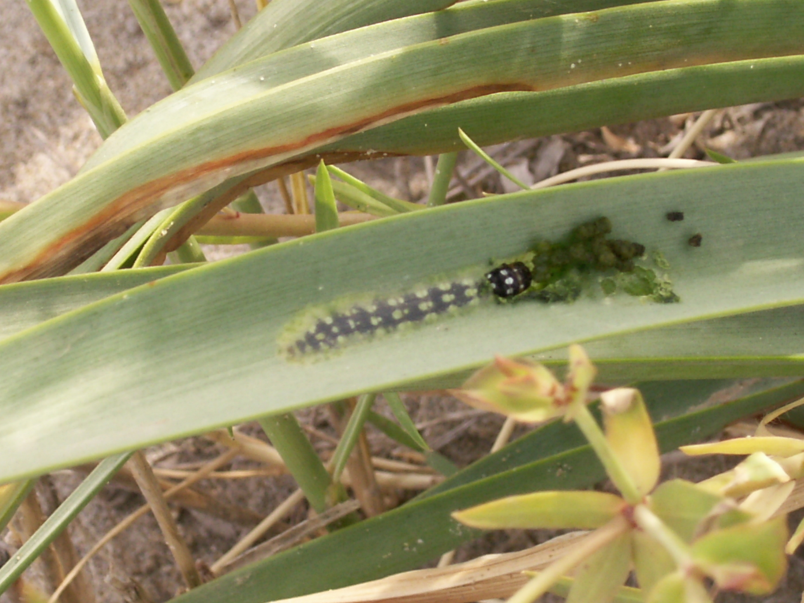 Orugas de Brithys crini pancratii alimentándose dentro de las hojas del lirio de mar (Pancratium maritimum). Playa del Serradal. Castellón. 25 de mayo de 2007